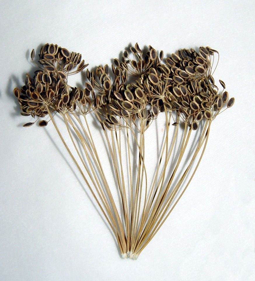 Dill, dried umbel German description: Dill, getrocknete Dolde